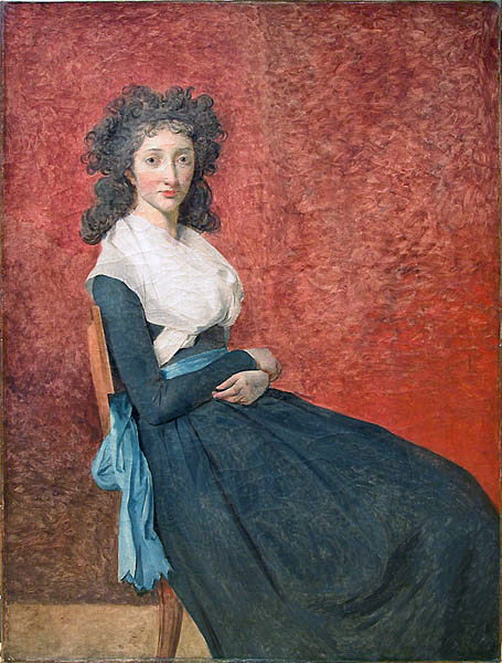 reproduction publiée dans David de C. Saunier 1903